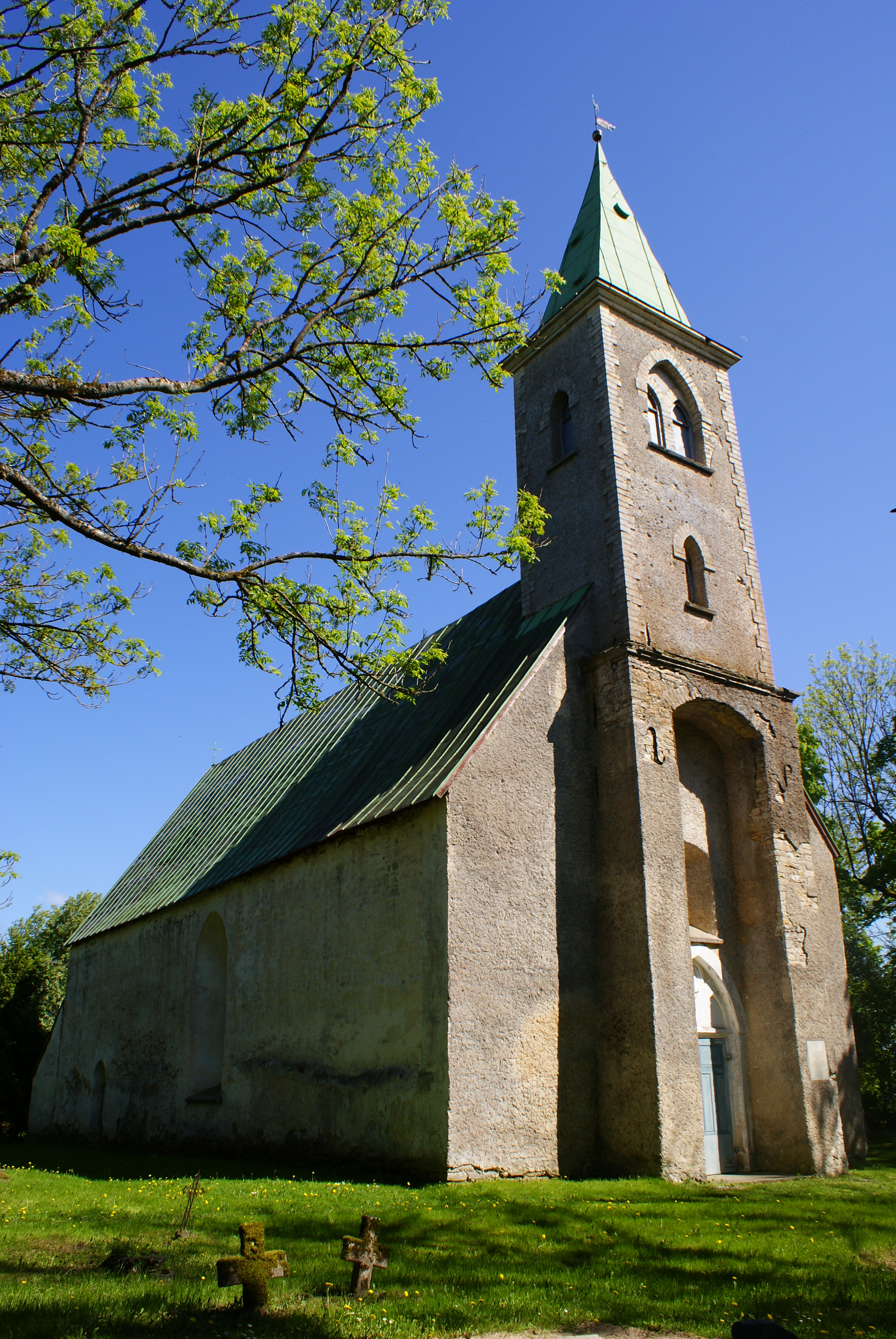 Kirbla kirik